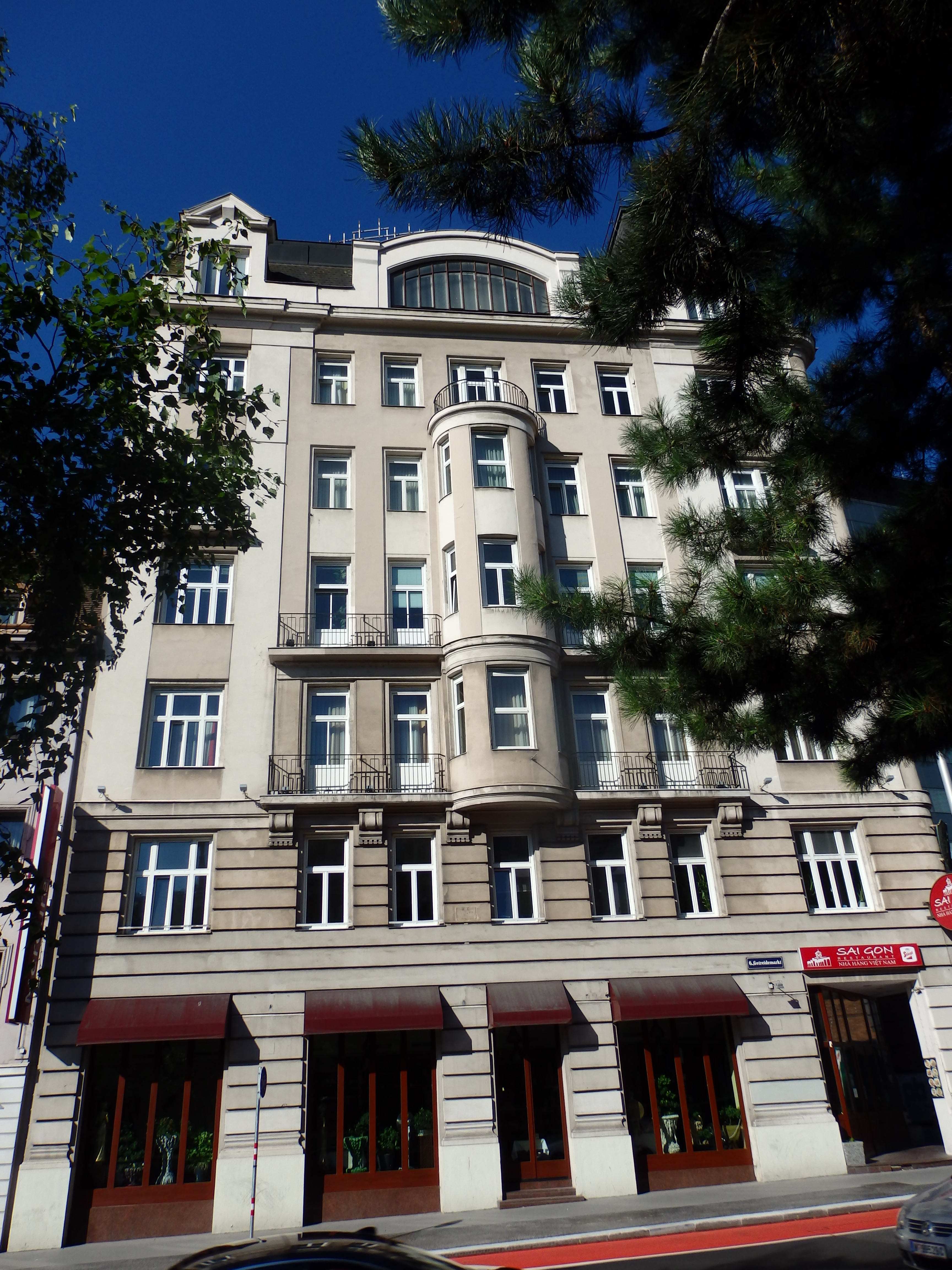 Hotel (1910) von Franz Karl Mörtinger, Getreidemarkt 7, Wien-Mariahilf